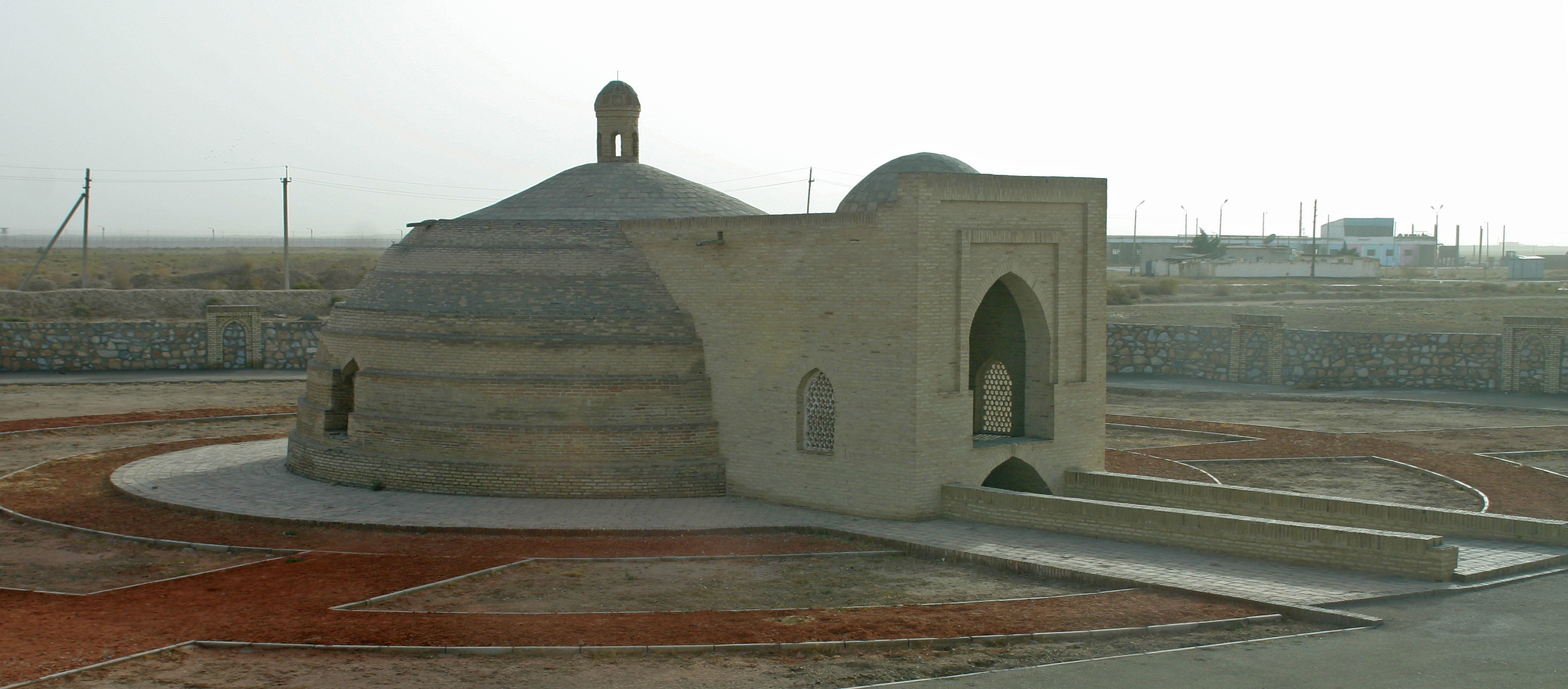 Malik Sardoba nahe Buchara in Usbekistan, Wasserbehälter zum ehemaligen Palast Rabat-i Malik